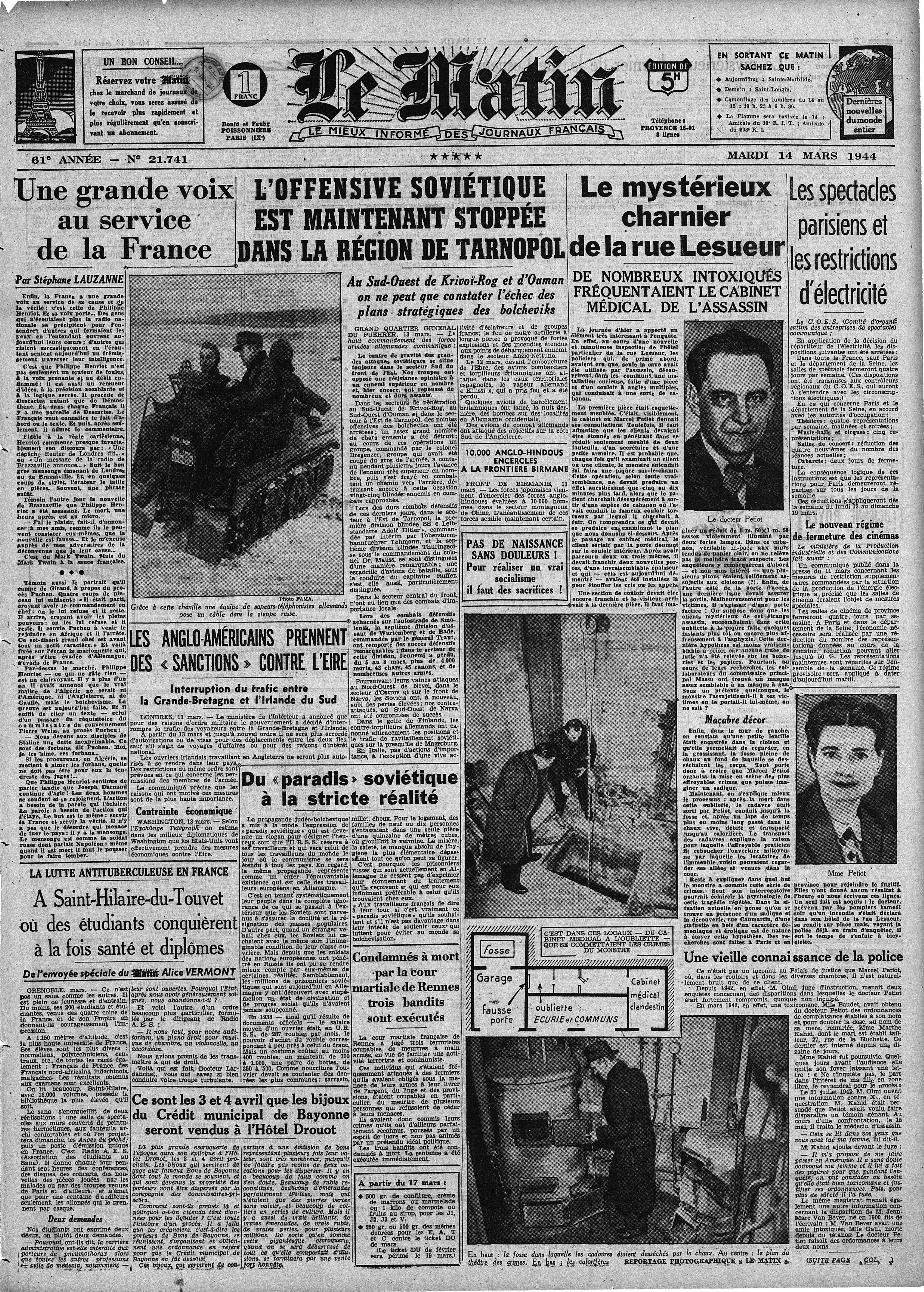 Une du journal Le Matin, 14 mars 1944.